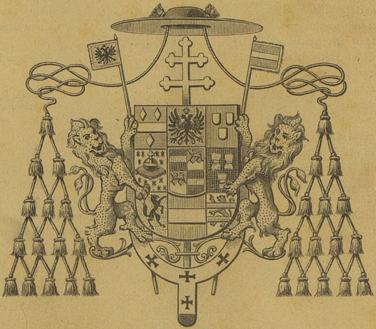 Znak kardinála Františka Schönborna, arcibiskupa pražského.